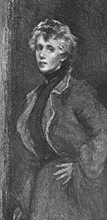 Self-portrait